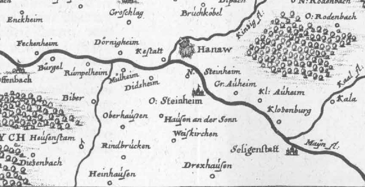 Gebiet des Amtes Steinheim, Ausschnitt aus einer Karte von Matthäus Merian